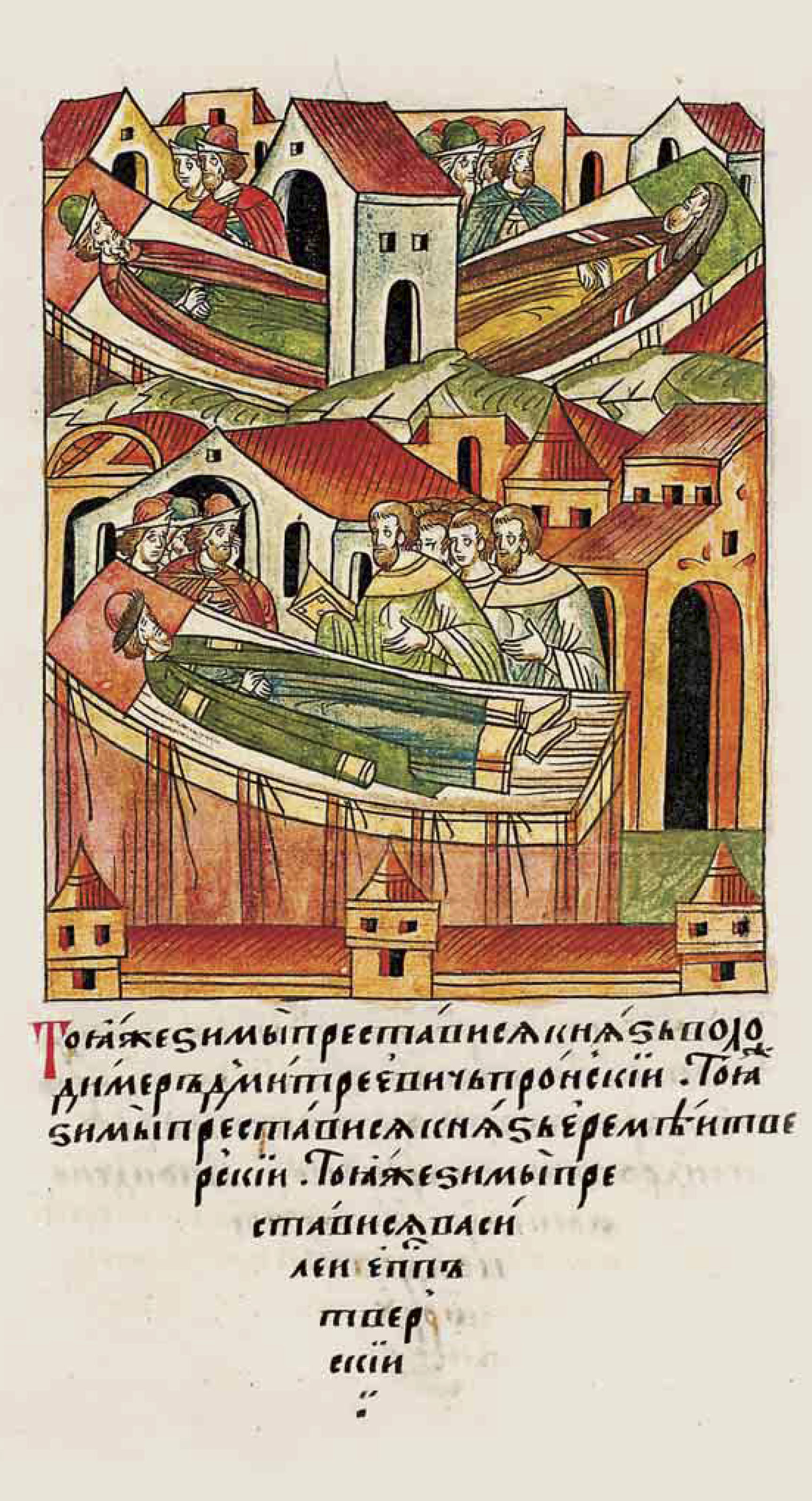 ЛИЦЕВОЙ ЛЕТОПИСНЫЙ СВОД В ту же зиму преставился князь Владимир Дмитриевич Пронский. В ту же зиму преставился князь Еремей Тверской. В ту же зиму преставился Василий, епископ Тверской.